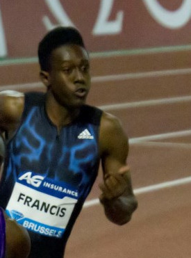 Miguel Francis during Memorial Van Damme 2015, Brussels